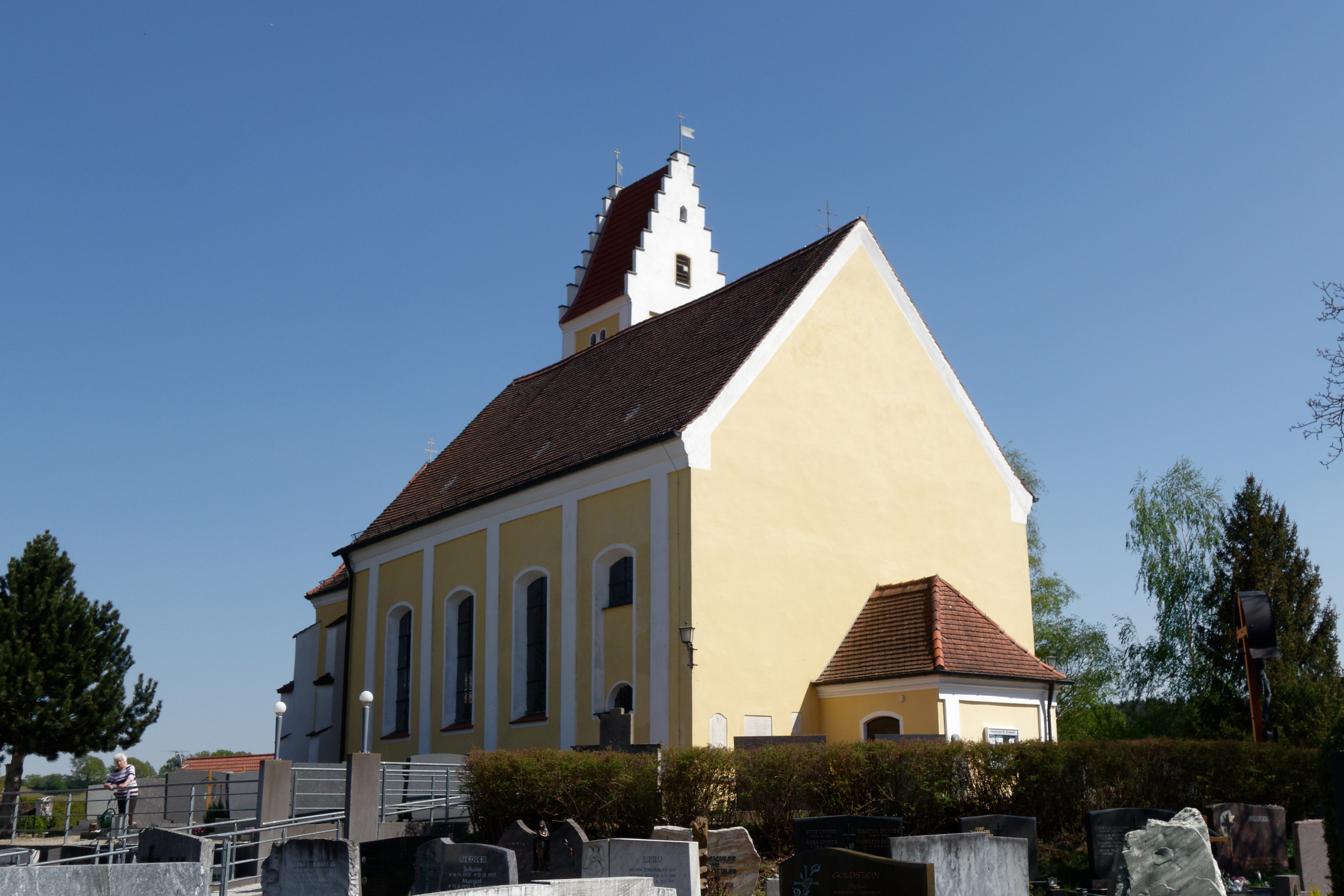 St. Elisabeth (Adelzhausen)